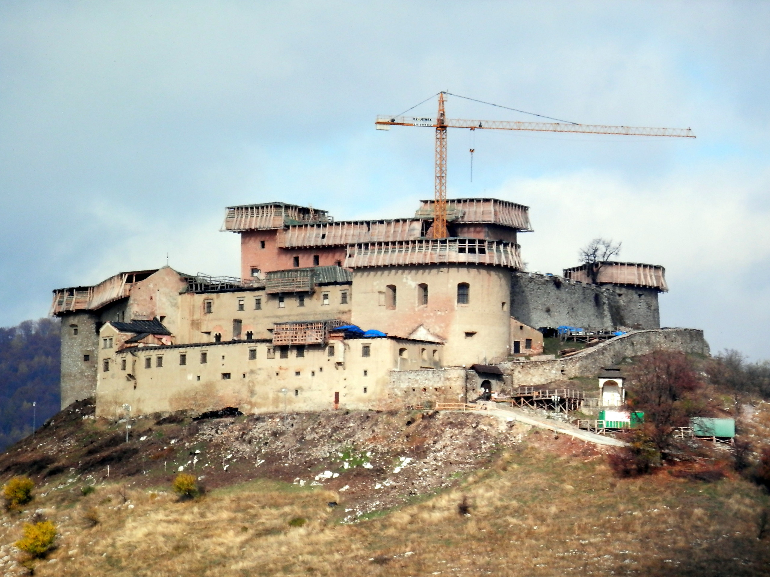 Hrad Krásna Hôrka v Krásnohorskom Podhradí okres Rožňava.